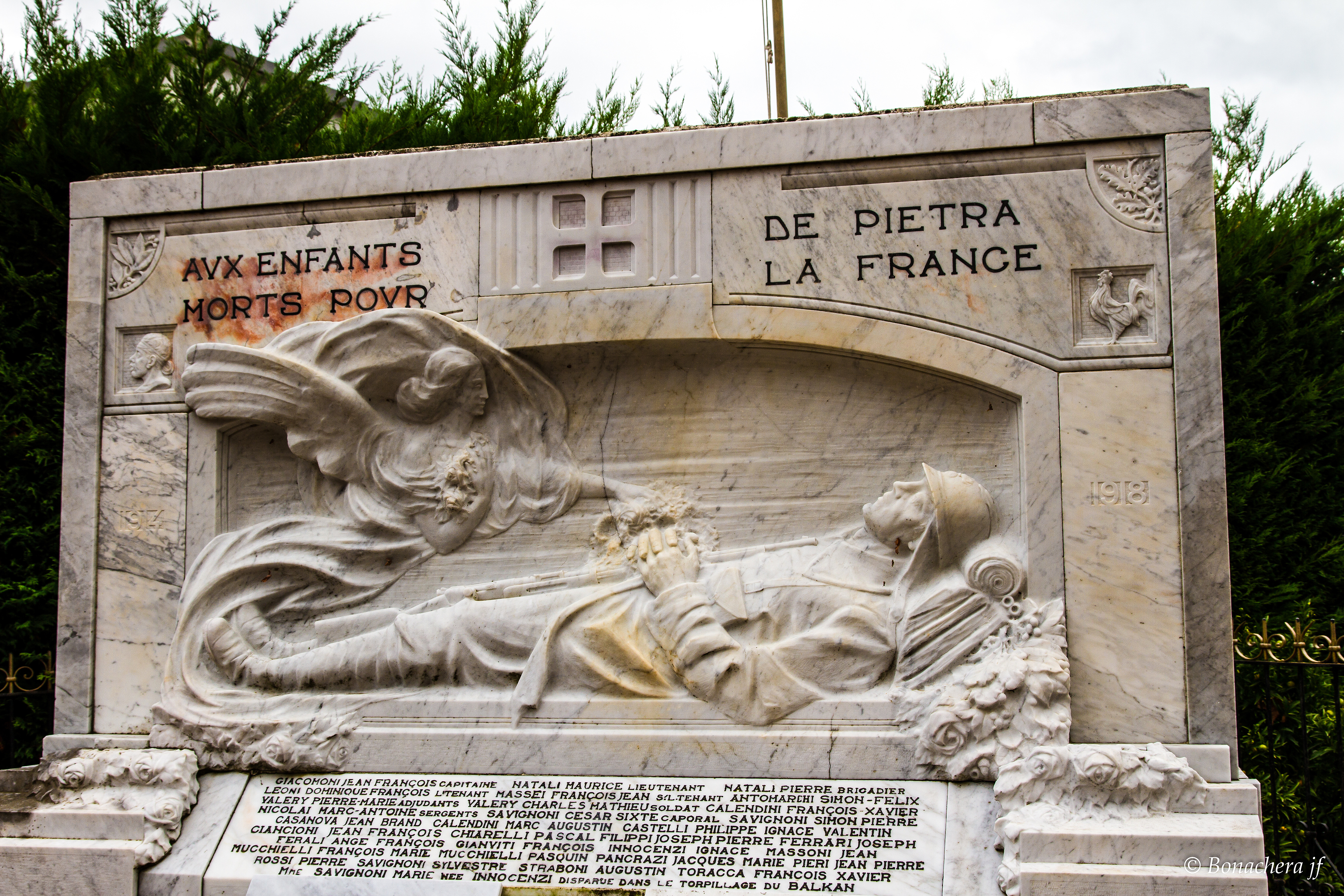 Pietra-di-Verde (Haute-Corse) - Le monument aux morts devant l'église